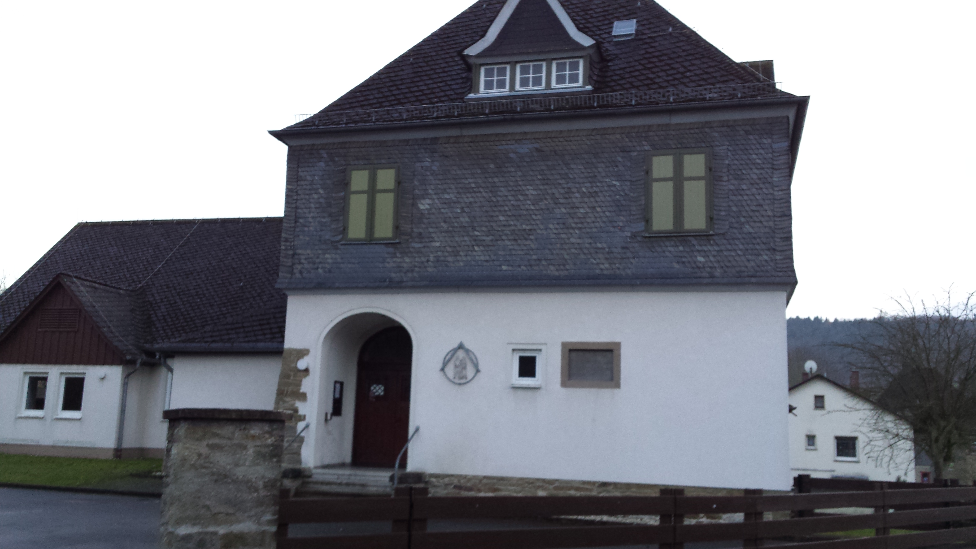 Gemeindehaus Blessenbach, Weinbach